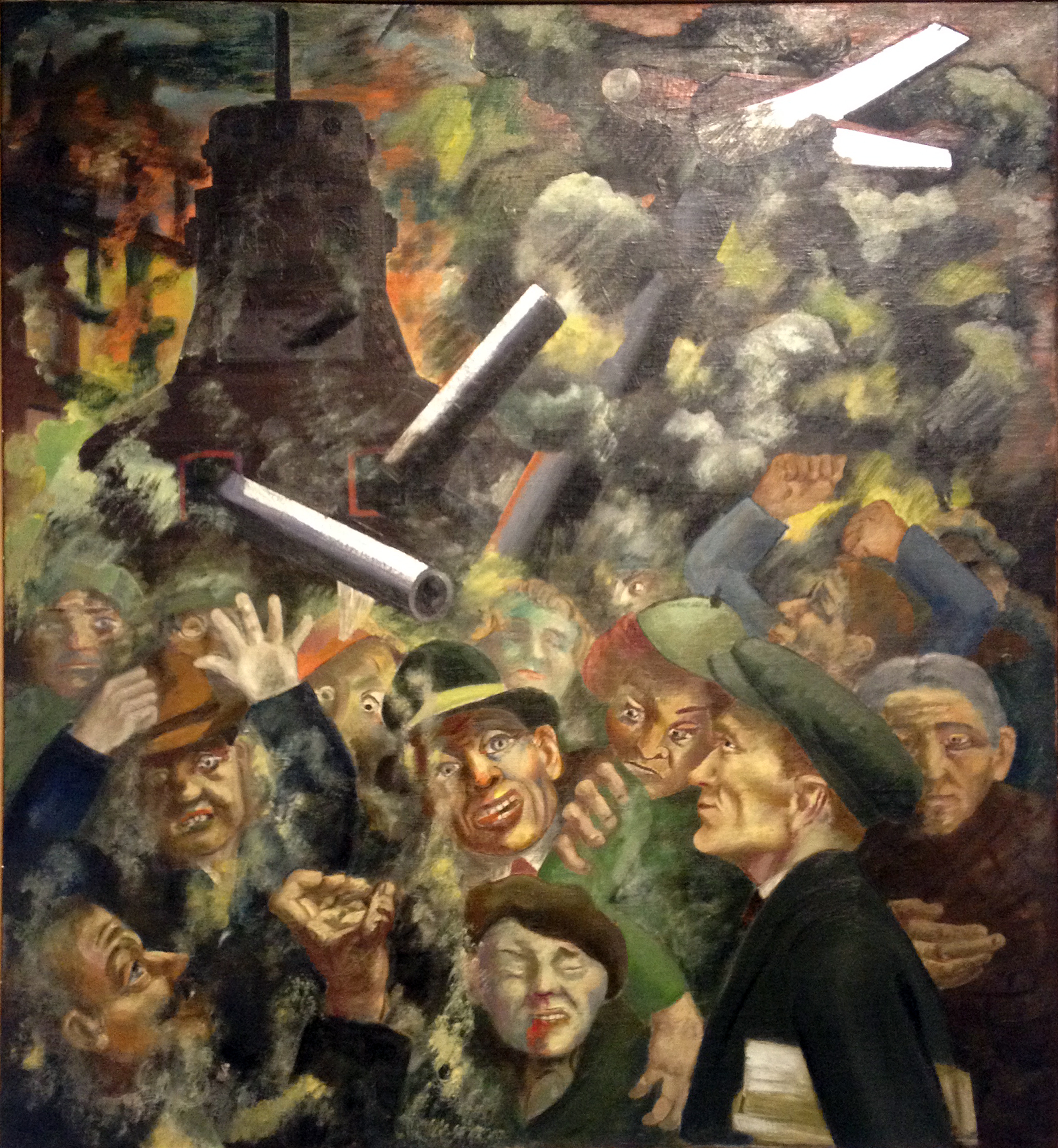 Peter Ludwigs (1888-1943) "Der Krieg", 1937, Öl und Collage auf Leinwand, Inv.-Nr. 0.1979.29, aus dem Nachlass des Künstlers